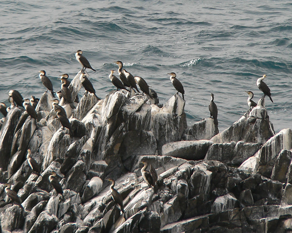 White-breasted Cormorants on Île des Serpents, Senegal. Phalacrocorax lucidus or Phalacrocorax carbo lucidus